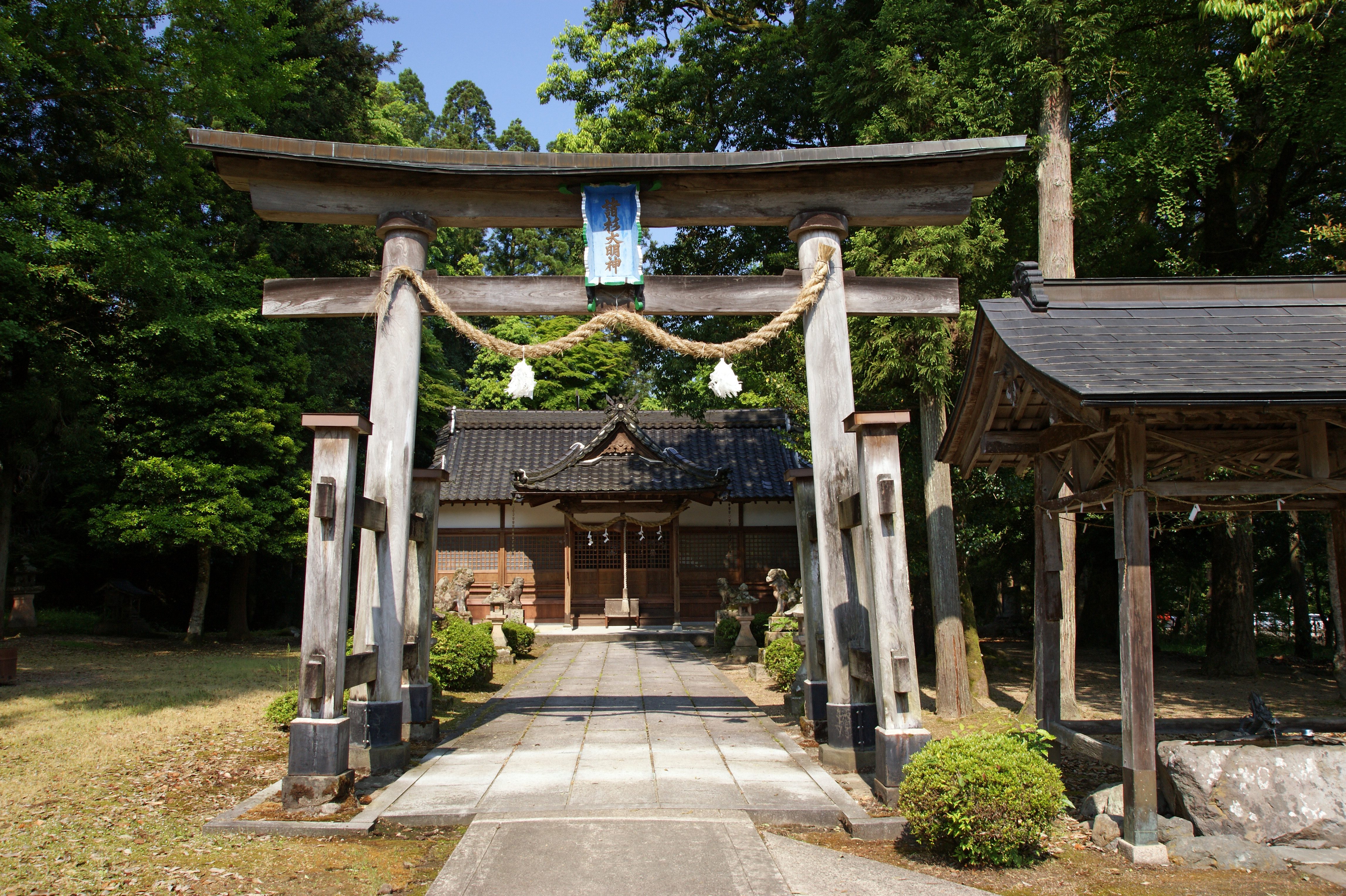 Morosugi-jinja in Izushi, Toyooka, Hyogo prefecture, Japan